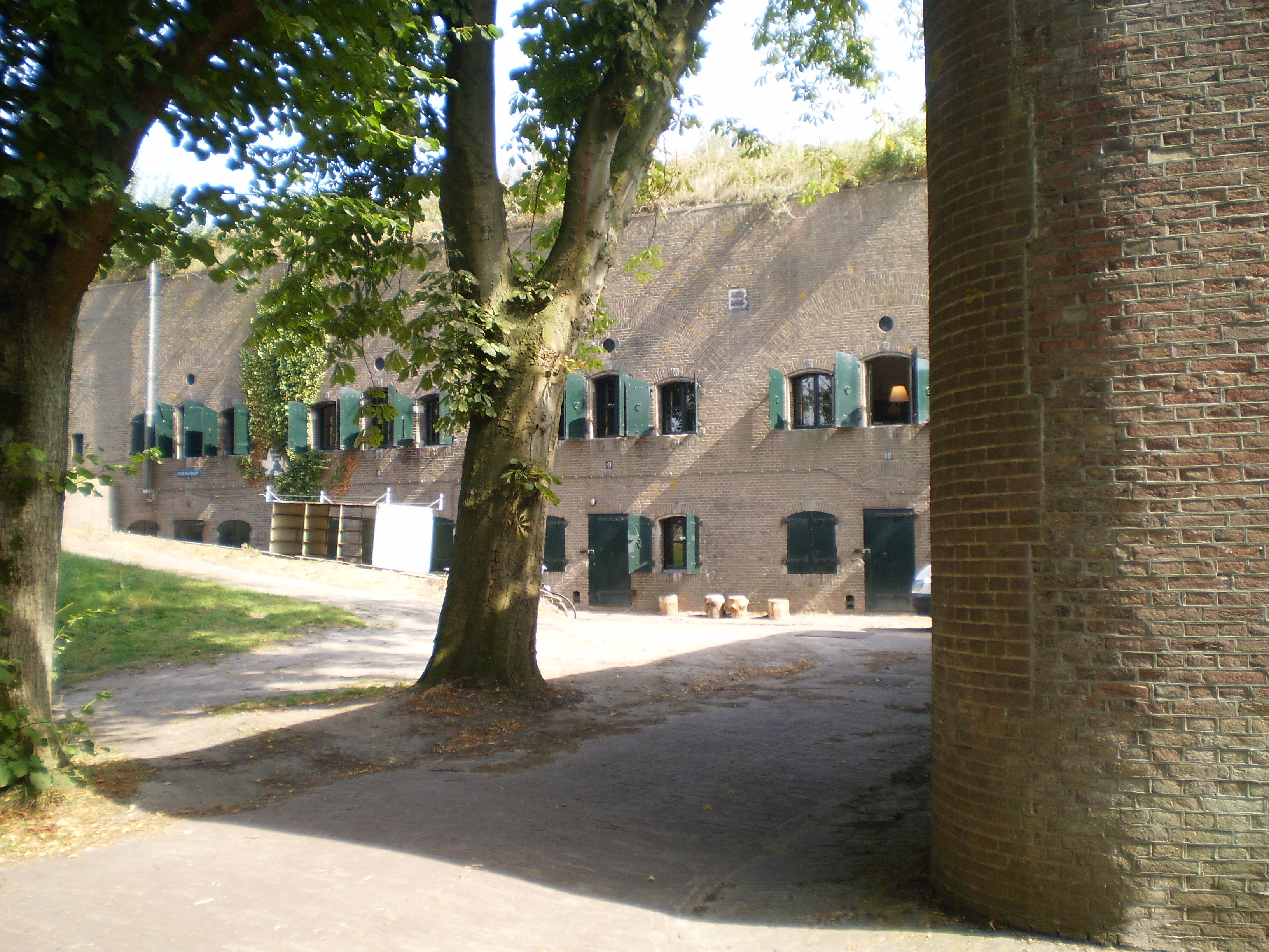 Fort De Gagel.